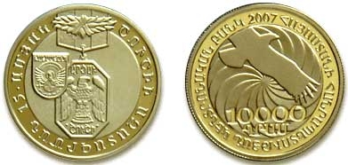 Юбилейная монета "Освобождение Шуши". 10,000 драм